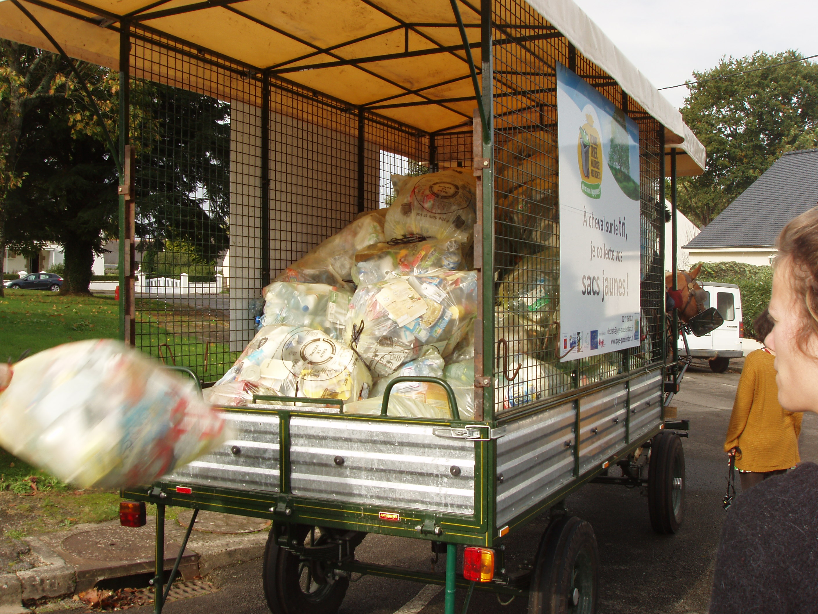 Questembert (Morbihan, France) : Ramassage des déchets par les chevaux.